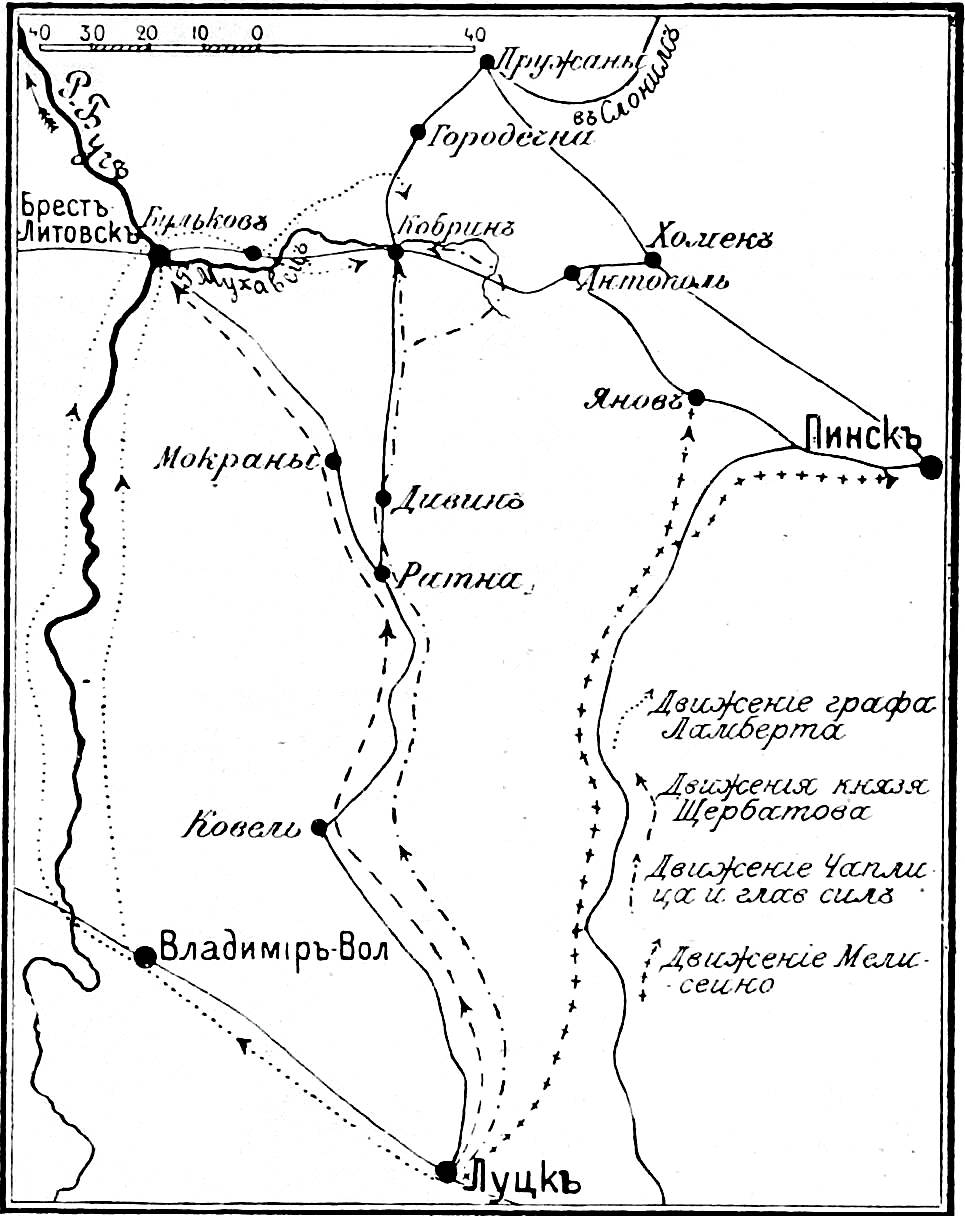 Эта фотография была использована для иллюстрирования статьи «Кобрин» опубликованной в тринадцатом томе «Военной энциклопедии», который был издан книгоиздательским товариществом И. Д. Сытина в 1913 году в столице Российской империи городе Санкт-Петербурге. Более подробное описание к этой картинке можно прочесть в указанной выше статье.